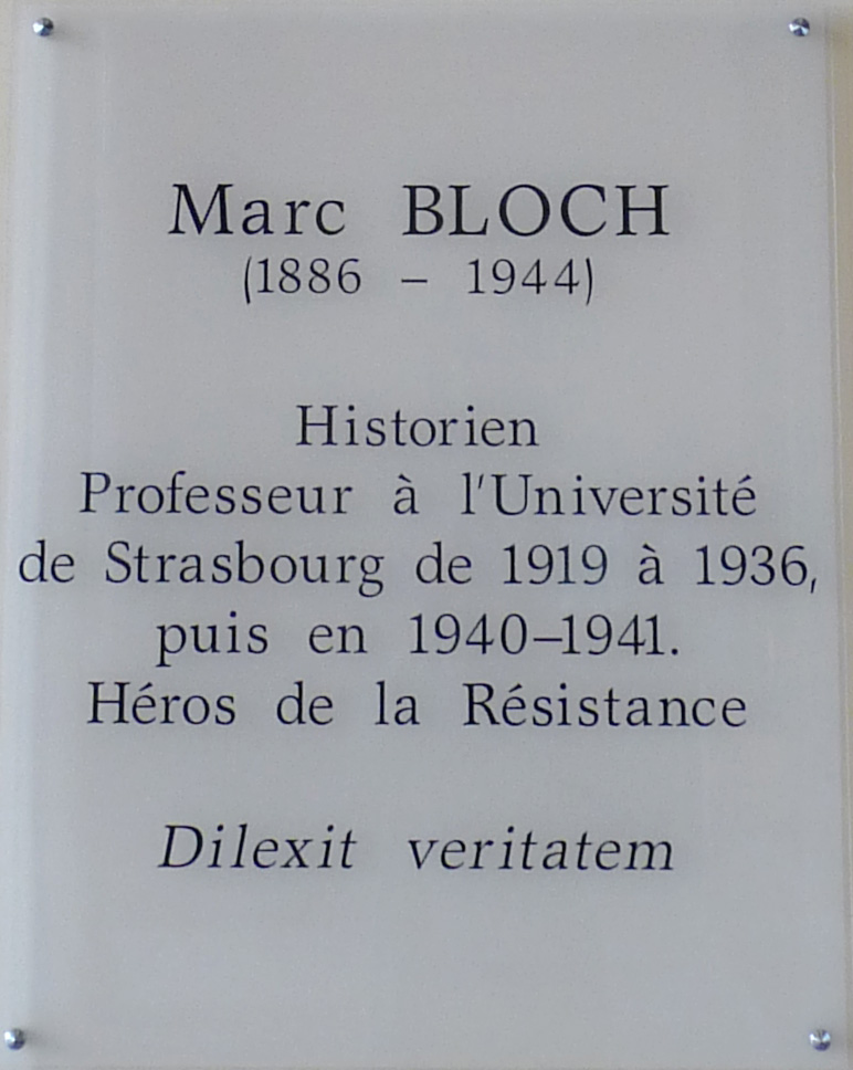 Plaque à la mémoire de Marc Bloch à l'entrée du Palais Universitaire de Strasbourg (ex-Université Marc Bloch)